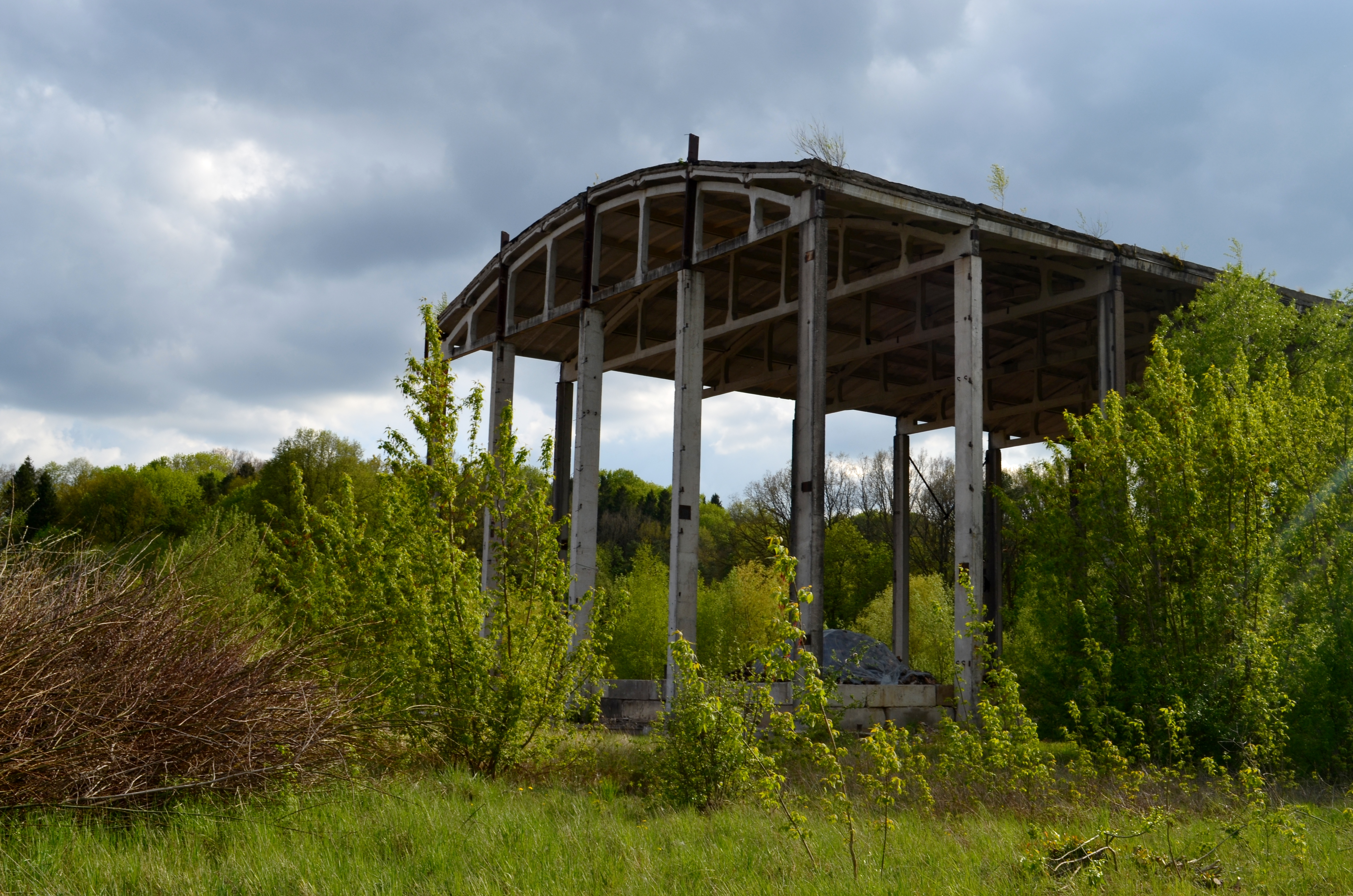 Angaras Skaistakaimyje, Šakių raj.